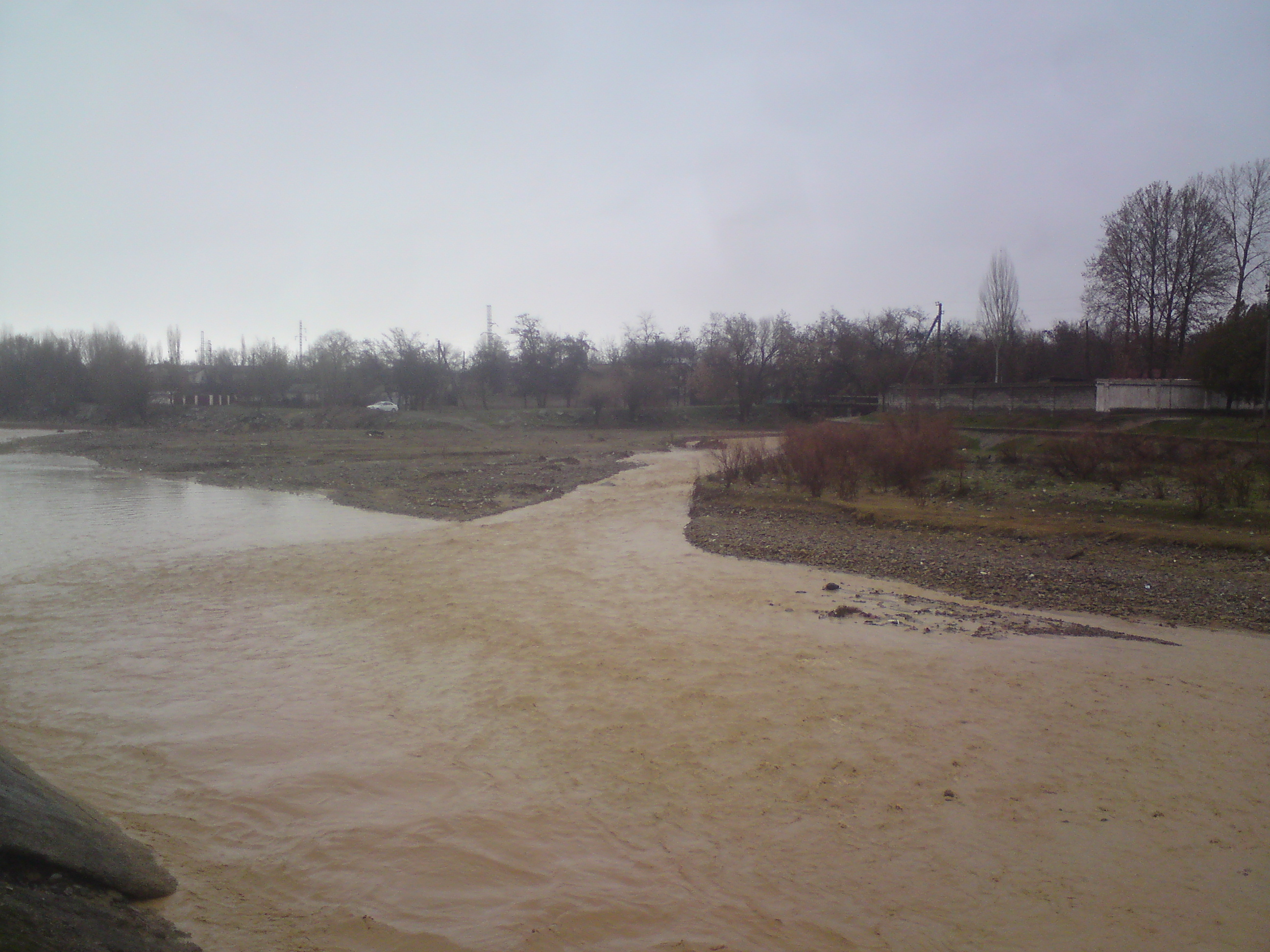 Река Паркентсай впадает в реку (по другим трактовкам - канал) Левобережный Карасу, посёлок Янгибазар, Ташкентский вилоят